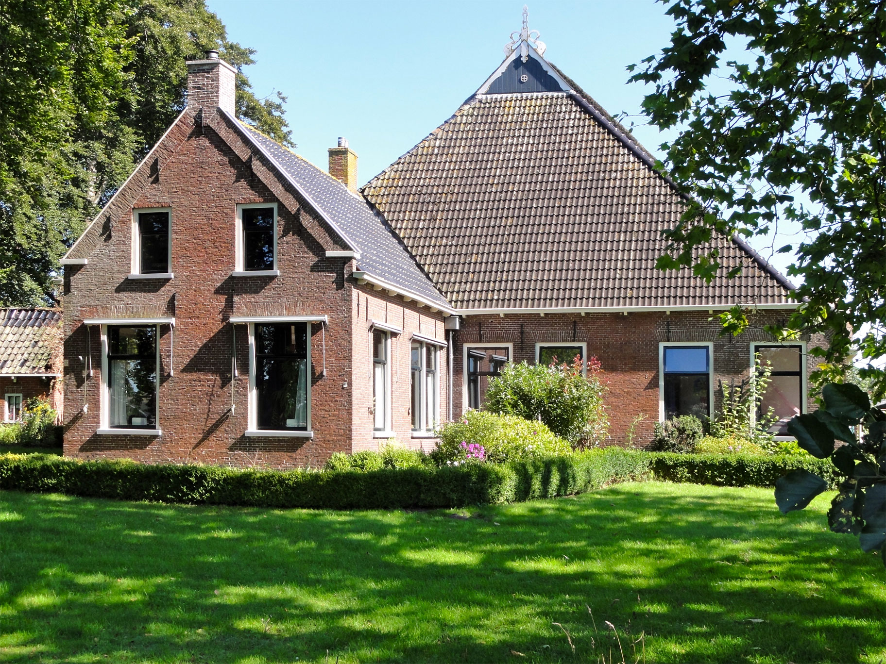 Boerderij aan de Boerestreek 6 It Heechsan